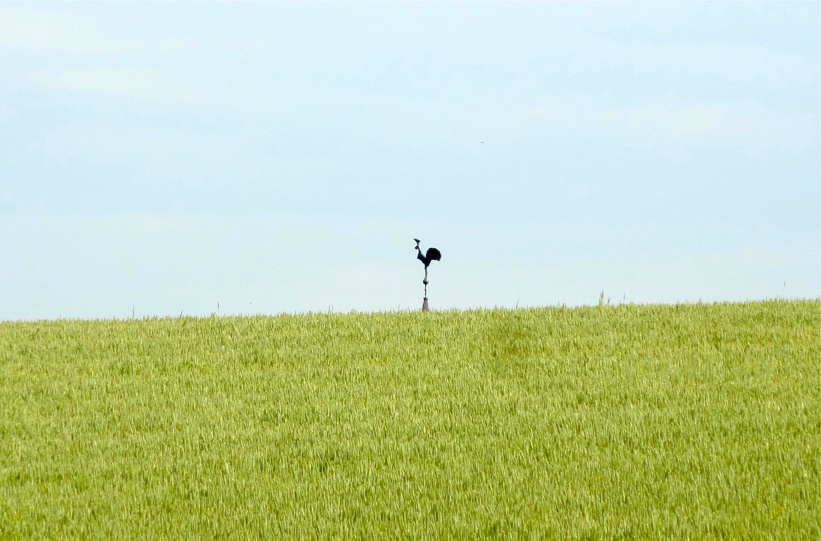 Zollikerberg: Spitze des Turmes der reformierten Kirche Zollikerberg